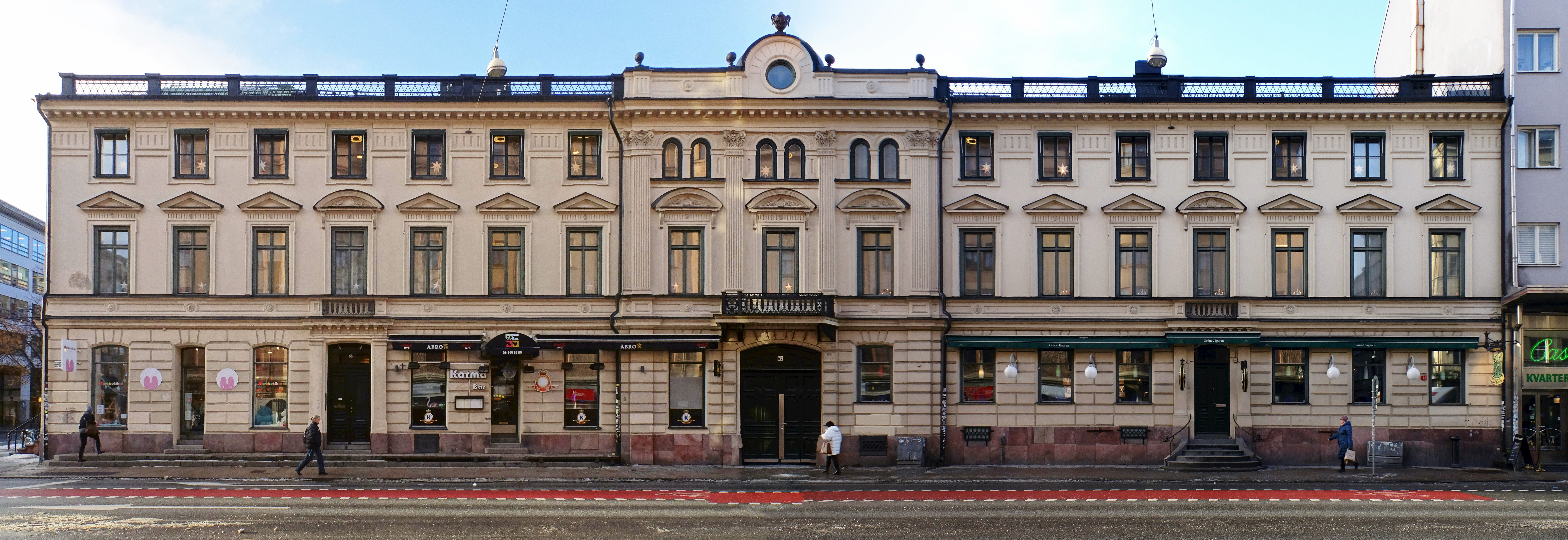 Hellgrenska palatset, Götgatan 64-68